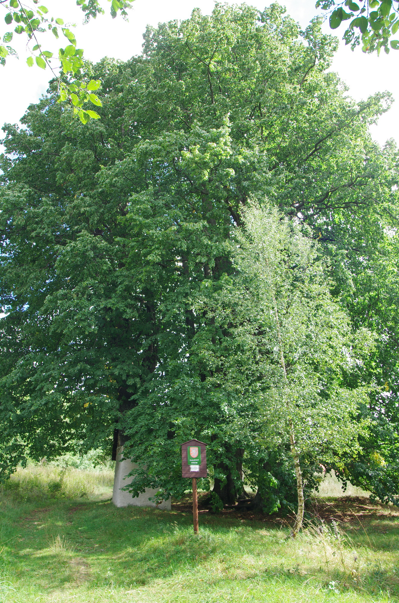 Památné stromy Lípy u kapličky, Krušné hory, okres Karlovy Vary